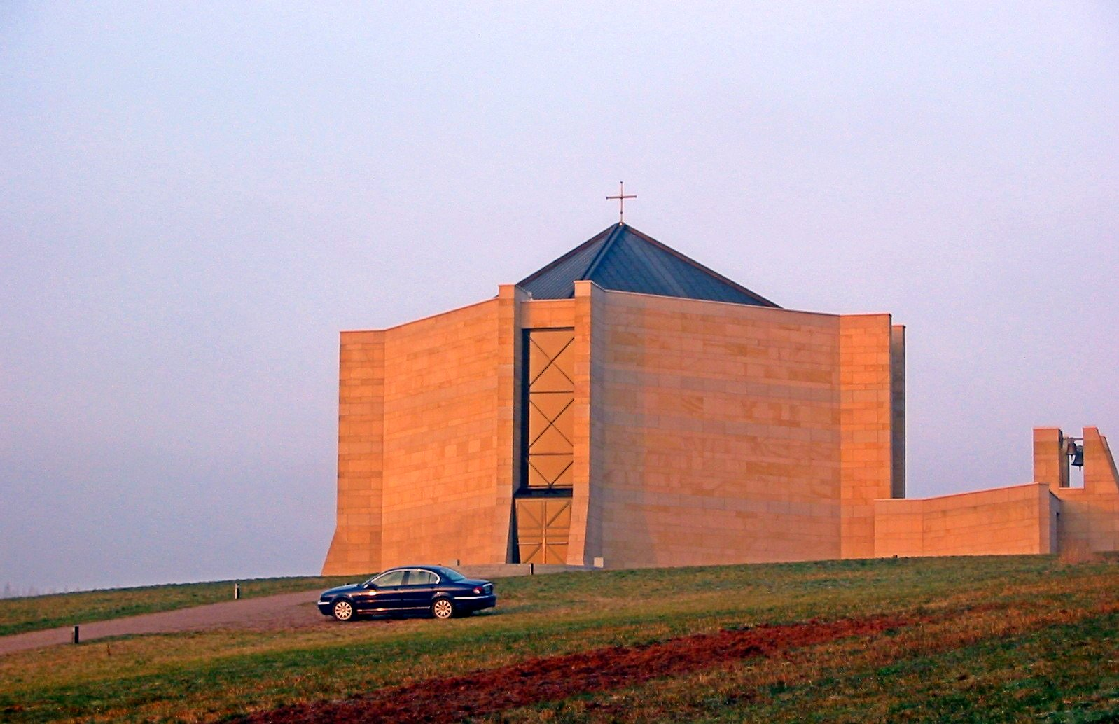 Kunstkirche Statio Dominus Mundi, Illingen-Wustweiler (Saarland)